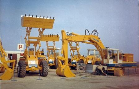 STAND BENATI- FIERA DI PLOVDIV- BULGARIA ANNI '60